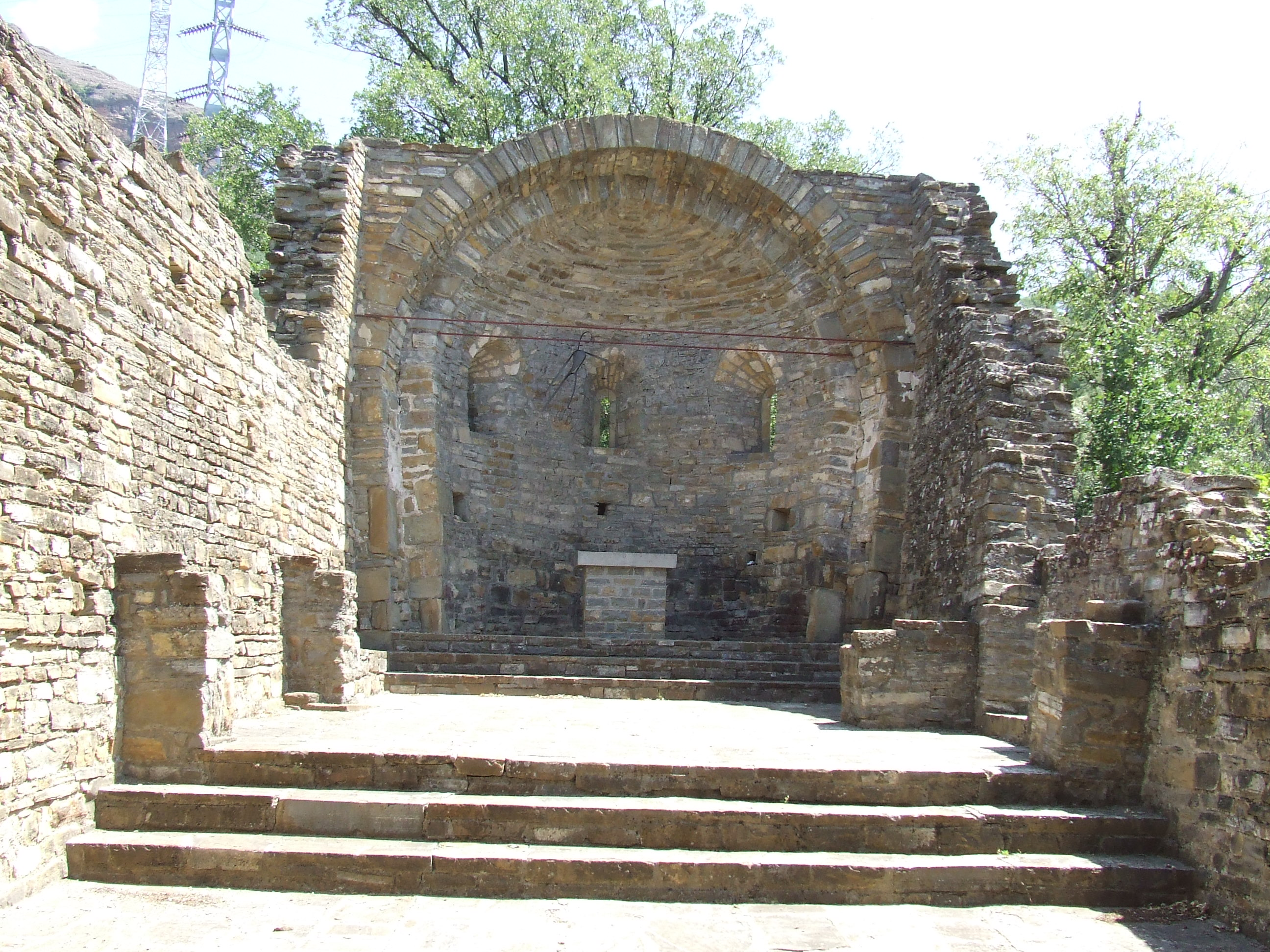 Sant Miquel del Pui Vell (la Pobla de Segur, Pallars Jussà)